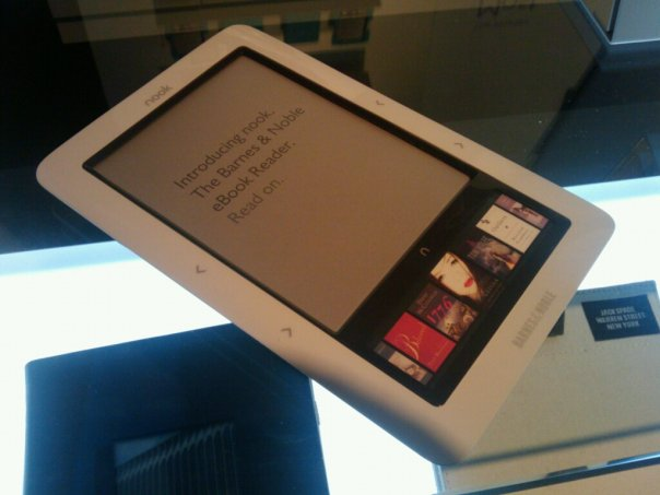 Barnes & Noble nook (ebook reader device)